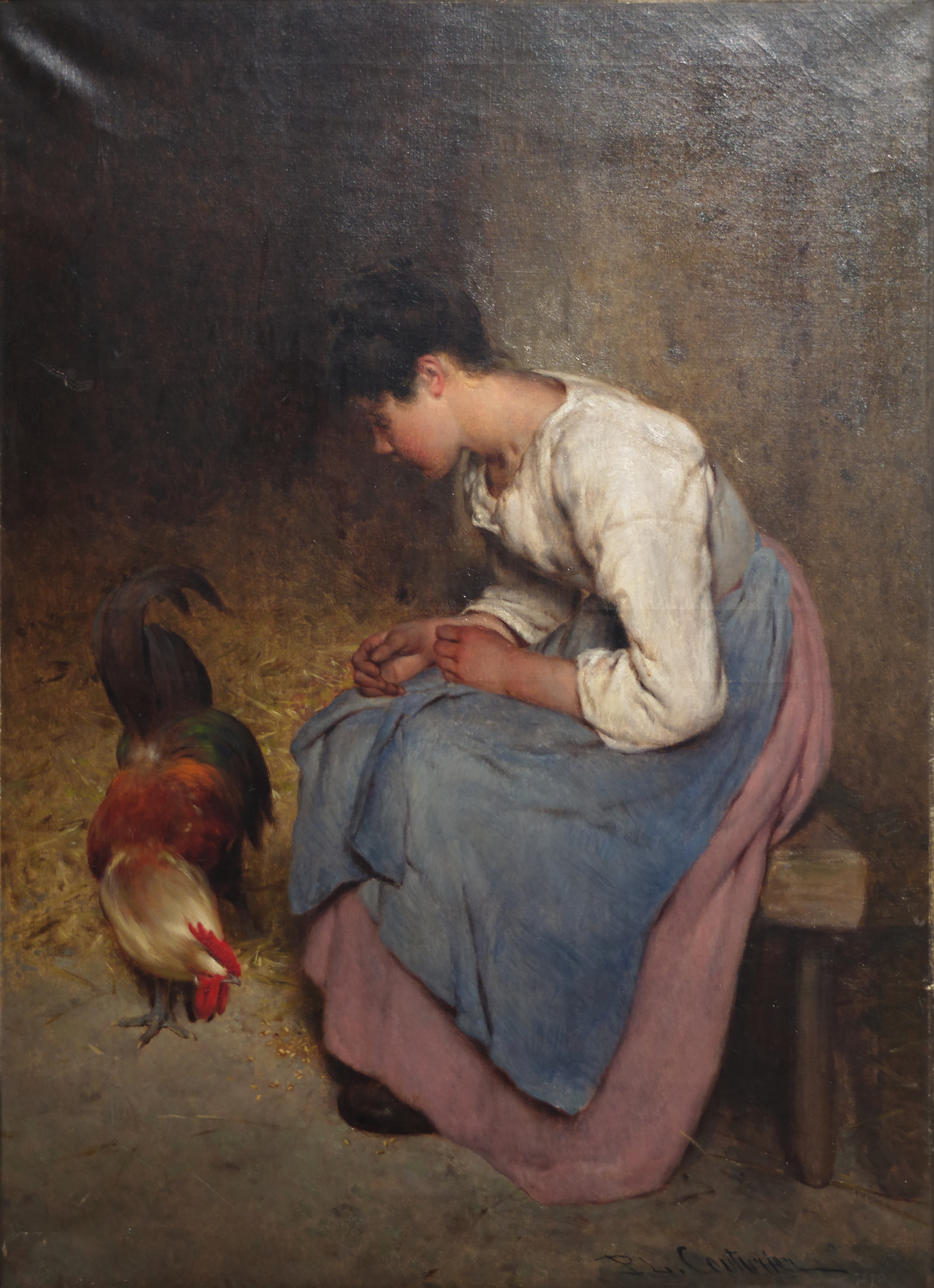 Un piège, Philibert Léon Couturier. S.b.g "PL Couturier". Huile sur toile 84,5 x 61 cm. Acquis en 1903. Musée des Ursulines de Mâcon. Inv A. 472